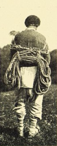 Беларуская (тарашкевіца): Традыцыйны бортнік зь лезівам